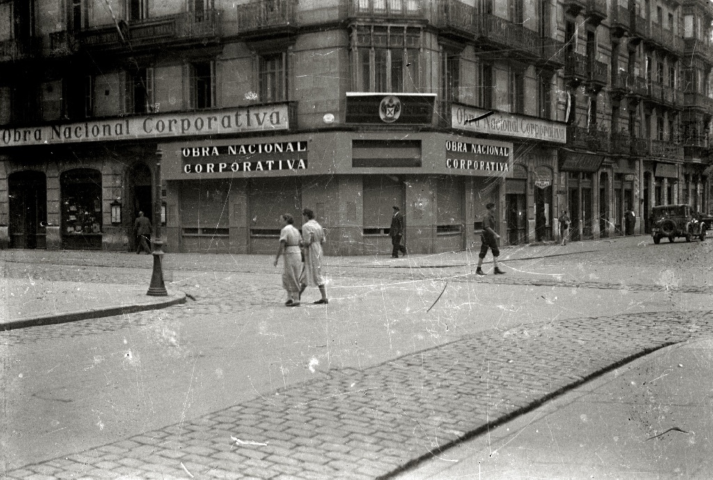 Título original: Vista de las sedes de la Obra Nacional Corporativa y Policlínica de Auxilio Social (2/2) Localización: Guipúzcoa